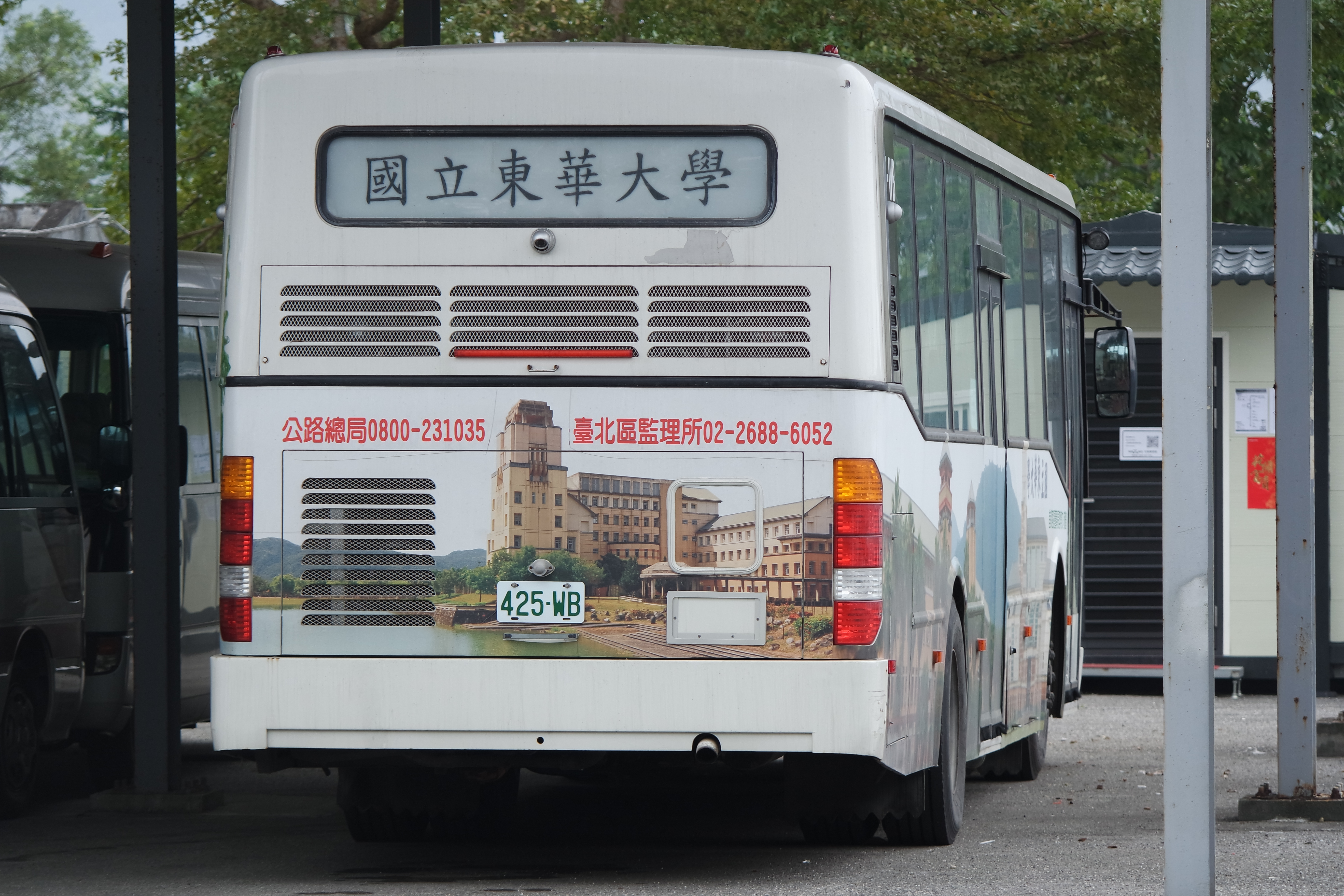 中文（台灣）: 國立東華大學日野ERK2JRL校車425-WB(原首都客運方燈車)